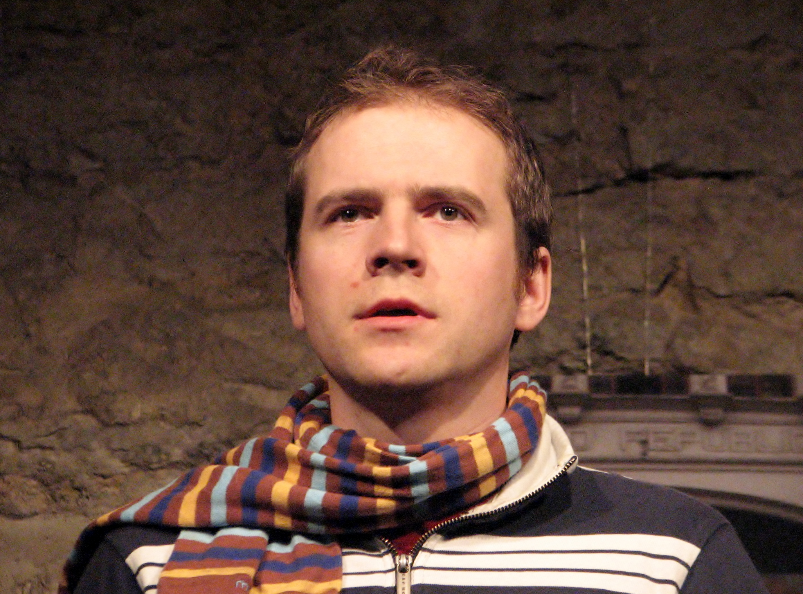 Rait Rosin esinemas Tallinna Poetry Slamil